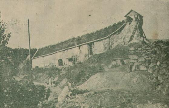 题名： 山東博山煤礦：[照片] 作者： 邱凌雲 攝 文献来源： 《时报图画周刊》 出版时间： 1922 年 卷期(页)： [ 第118期 ，0页 ] 中图分类号： J228